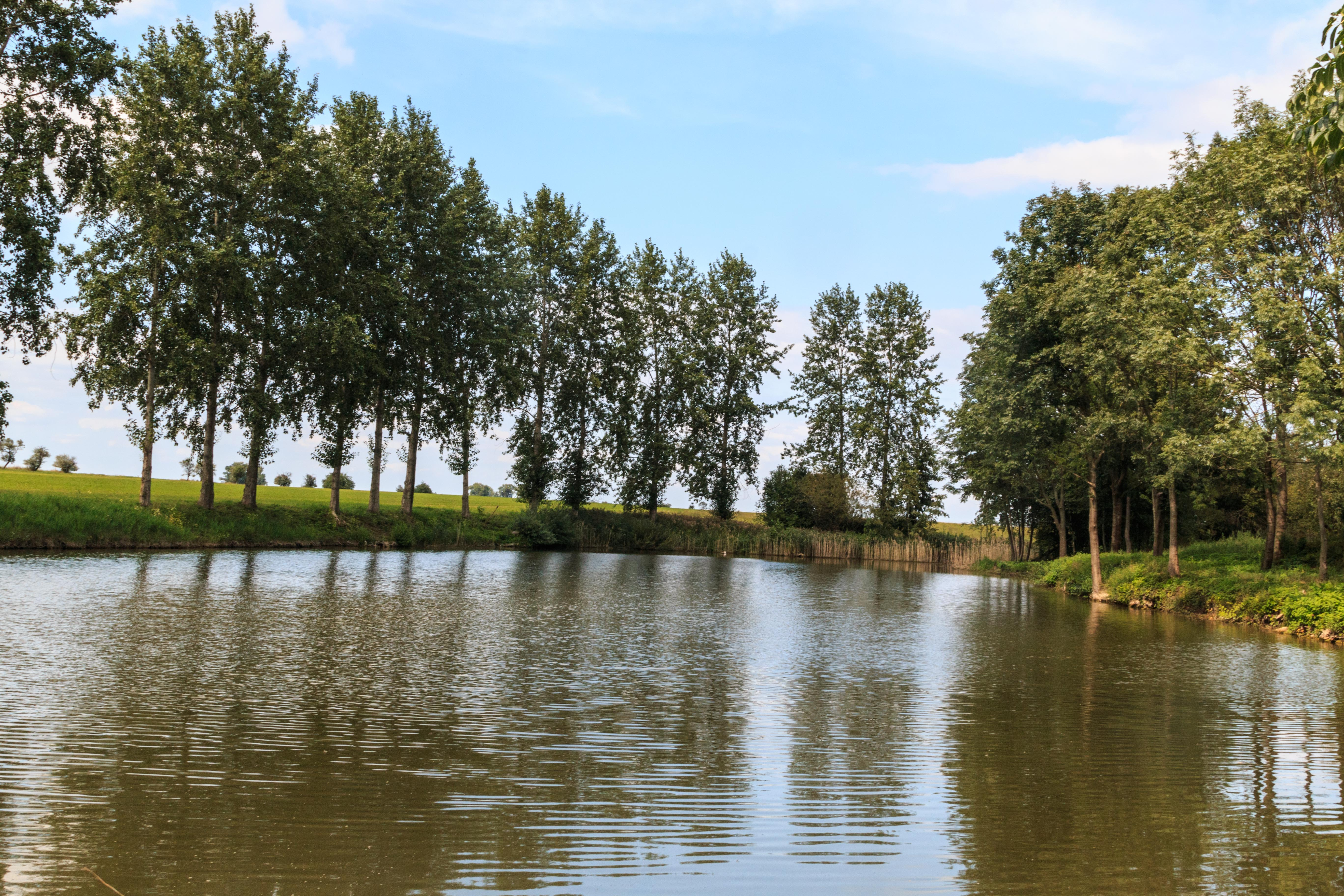 Rybník Mazanec u Uherska